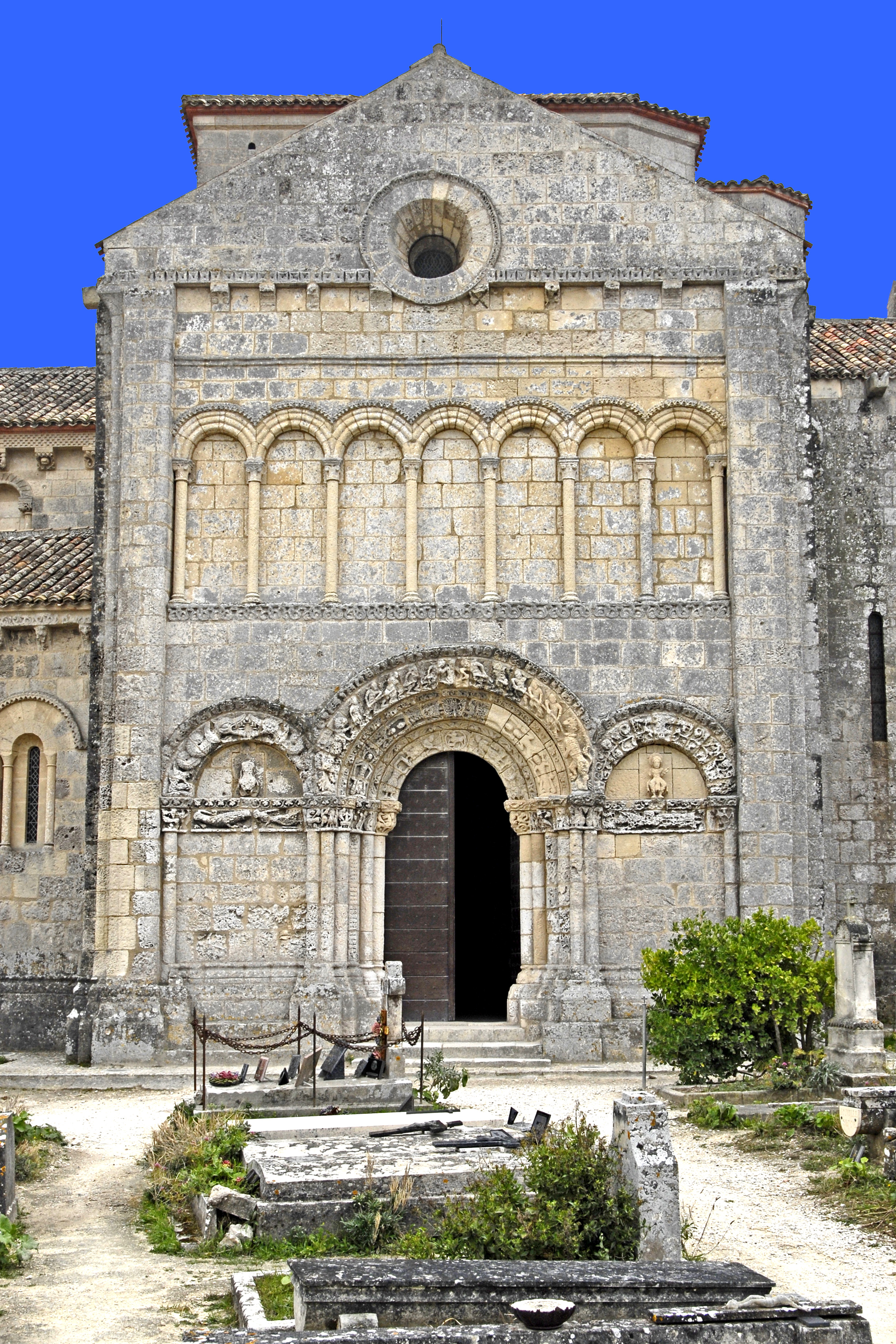 Sainte-Radegonde-Talmont-sur-Gironde, Nordfassade gesamt